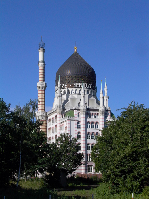 Foto gemaakt door Daniel van der Ree op 29 juli 2005